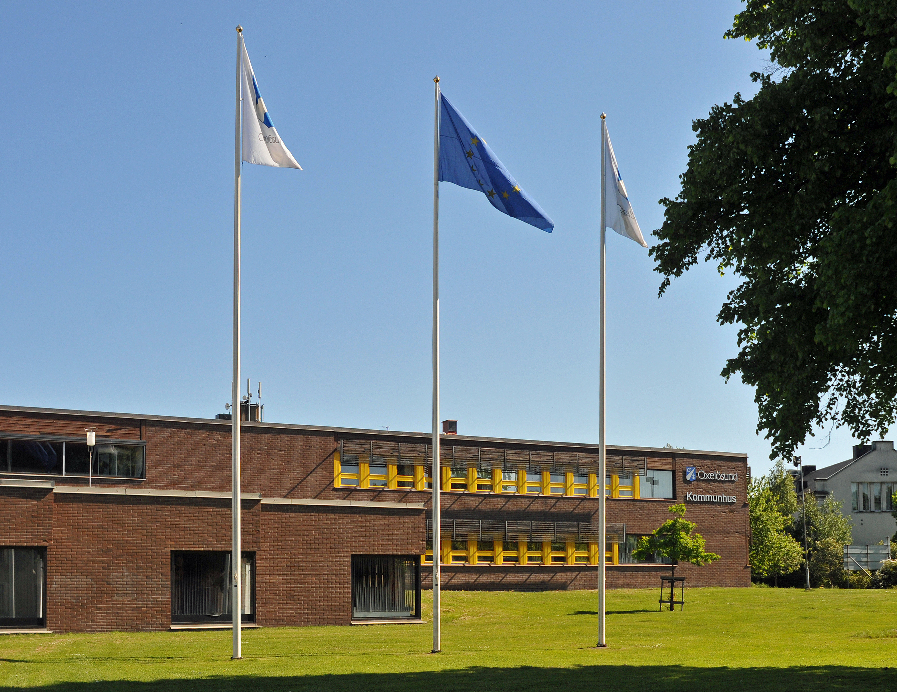 Oxelösunds kommunhus.